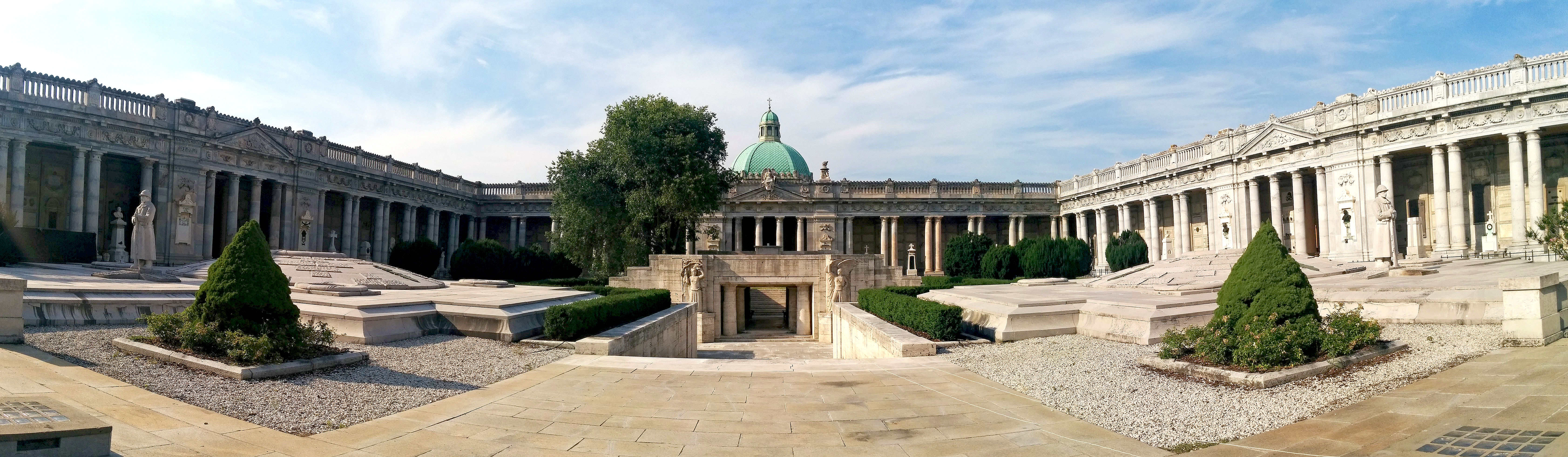 Al centro del grandioso Chiostro VI, il 28 ottobre 1932 venne inaugurato il monumento ai martiri della rivoluzione fascista, progettato dall’architetto Giulio Ulisse Arata (1881-1962), e con sculture di Ercole Drei (1886-1973). Il chiostro VI venne realizzato a partire dal 1901 e venne terminato negli anni venti del secolo; l'area centrale inizialmente era adibita alla normale inumazione a terra con lapidi a stele, e quindi è plausibile che nel progetto originario non fosse previsto la presenza 'ingombrante' di altri complessi monumentali. Il fascismo bolognese volle celebrare la marcia su Roma con la solenne traslazione, nel nuovo sacrario della Certosa, delle salme dei caduti per la causa del fascismo. Il sacrario si presenta come un vasto ipogeo sovrastato dall'Ara dei Caduti. La struttura architettonica povera di decorazioni e dai volumi semplici e dall'aspetto monolitico fu tra i progetti che l'architetto Arata ritenne tra i più riusciti del suo ampio catalogo di opere. Particolarmente felice è la collaborazione con lo scultore Ercole Drei, che seppe inserirsi armonicamente con le due grandiose allegorie della Forza (a sinistra) e della Gloria (a destra). La struttura fu costruita grazie ad una sottoscrizione pubblica ed è interamente eseguita in travertino di forte spessore, quando non monolitico. Nel corso del tempo il monumento non ha subito nessuna modifica ad eccezione dell'epigrafe a rilievo che si trovava sulla facciata principale, con tutta probabilità distrutta immediatamente dopo la fine del secondo conflitto mondiale.